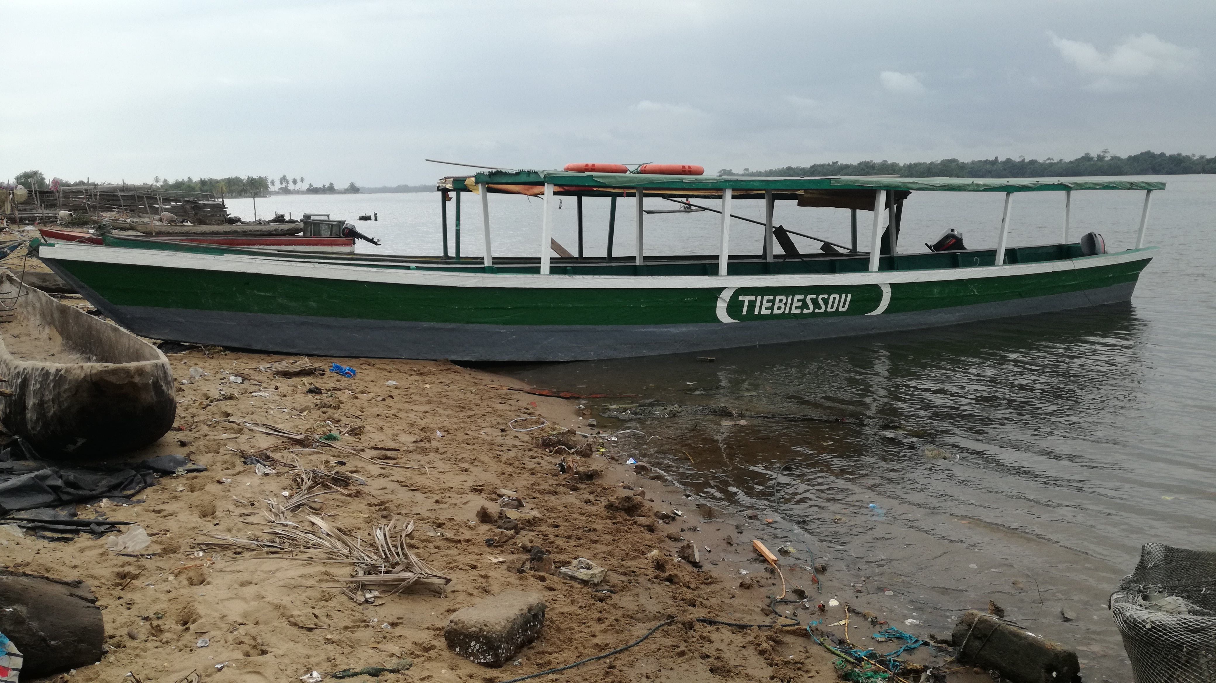 Bâteau de fabrication artisanale stationné à Grand-Lahou